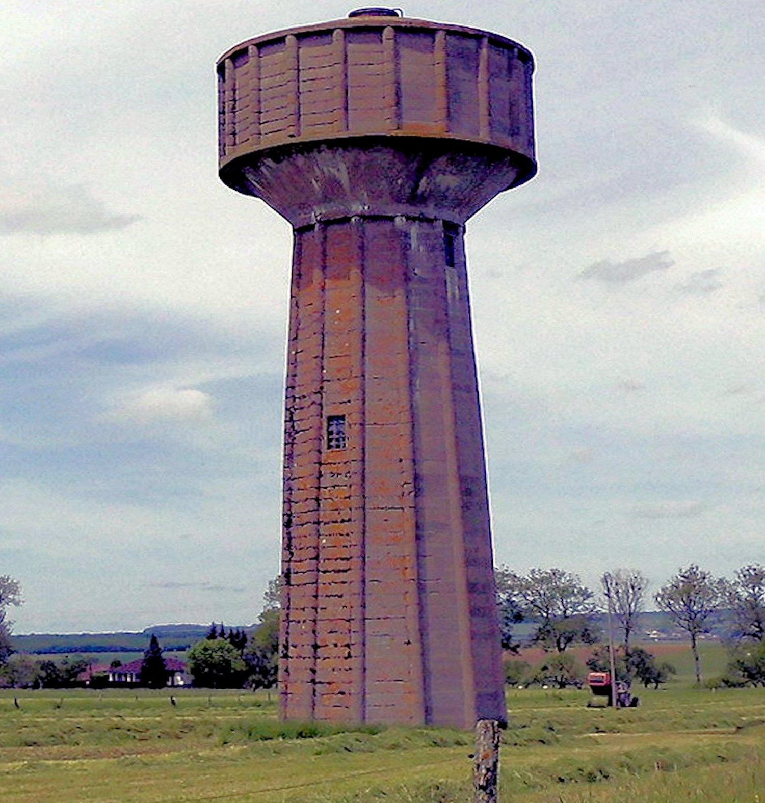 Le château d'eau à Ménil-en-Xaintois